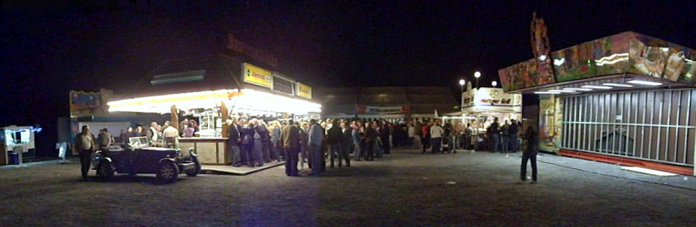 Die Kirmes des Moerser Ortsteils Schwafheim This image was created with Hugin.